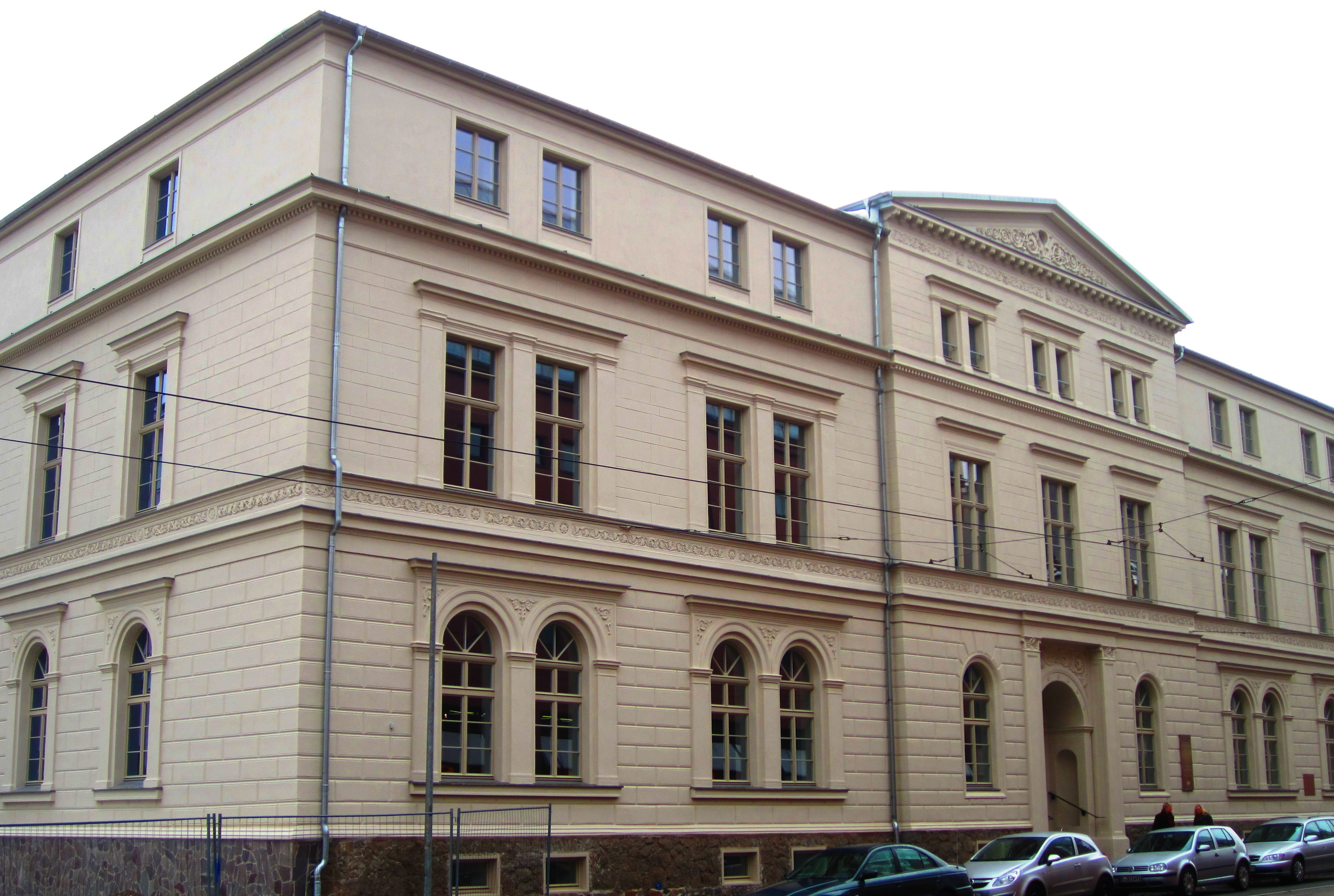 denkmalgeschütztes Gebäude in Frankfurt (Oder), Logenstraße 12